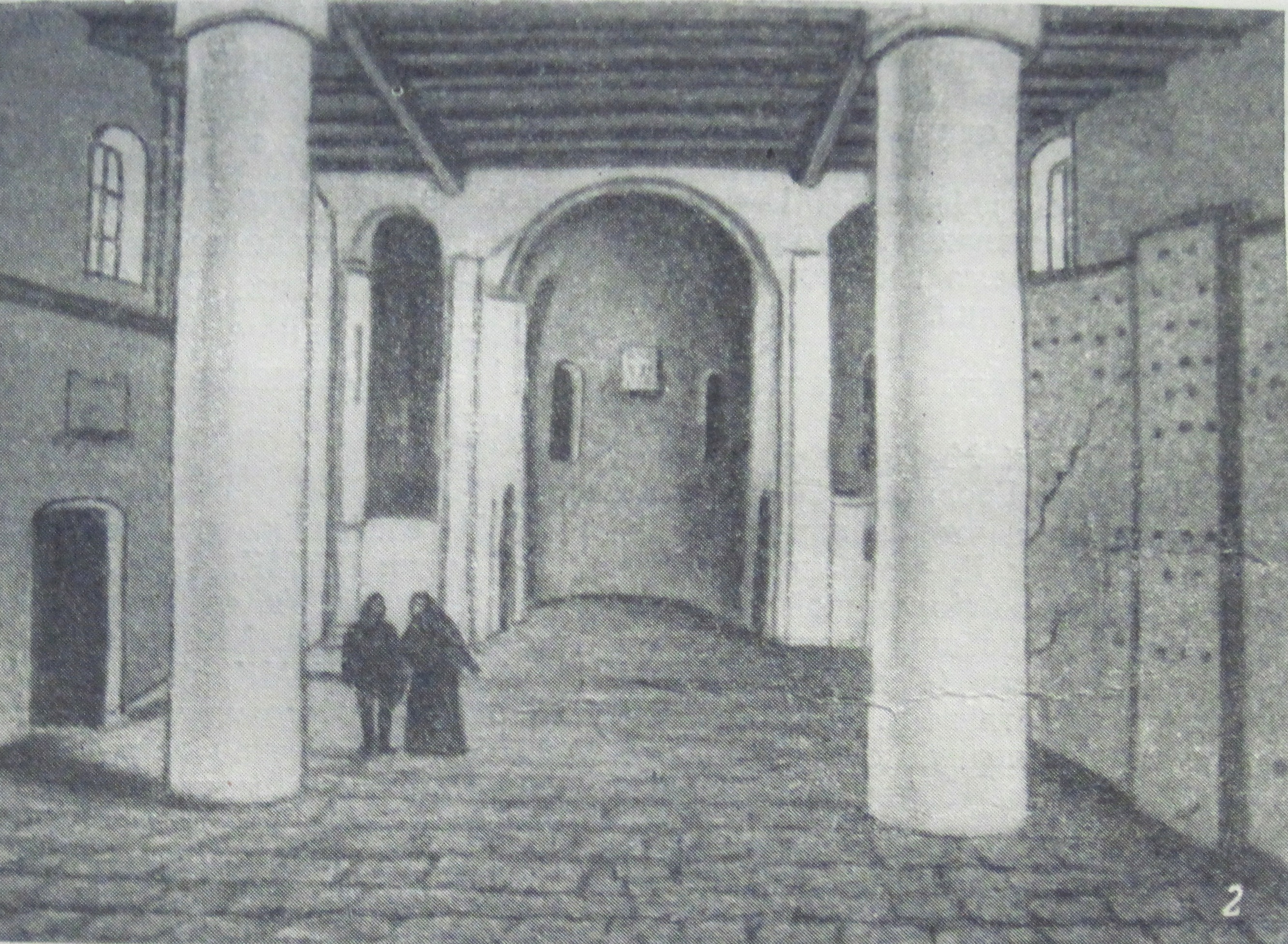 Малюнак інтер'еру Каложскай царквы ў Гродне